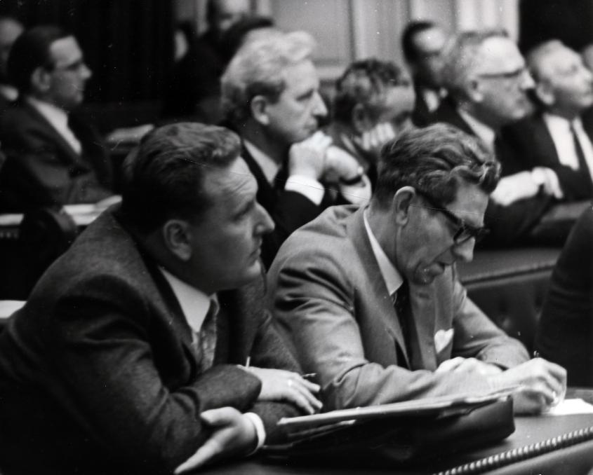 N. Verlaan en partijgenoot boer Koekoek van de Boerenpartij in de tweede Kamer. Den Haag, Nederland, 25 juni 1968.